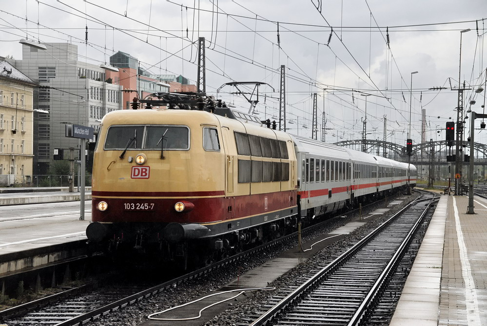 103 245 im strömenden Regen beim letzten Verkehrstag des D 1280 aus Zell, bei der Ankunft München